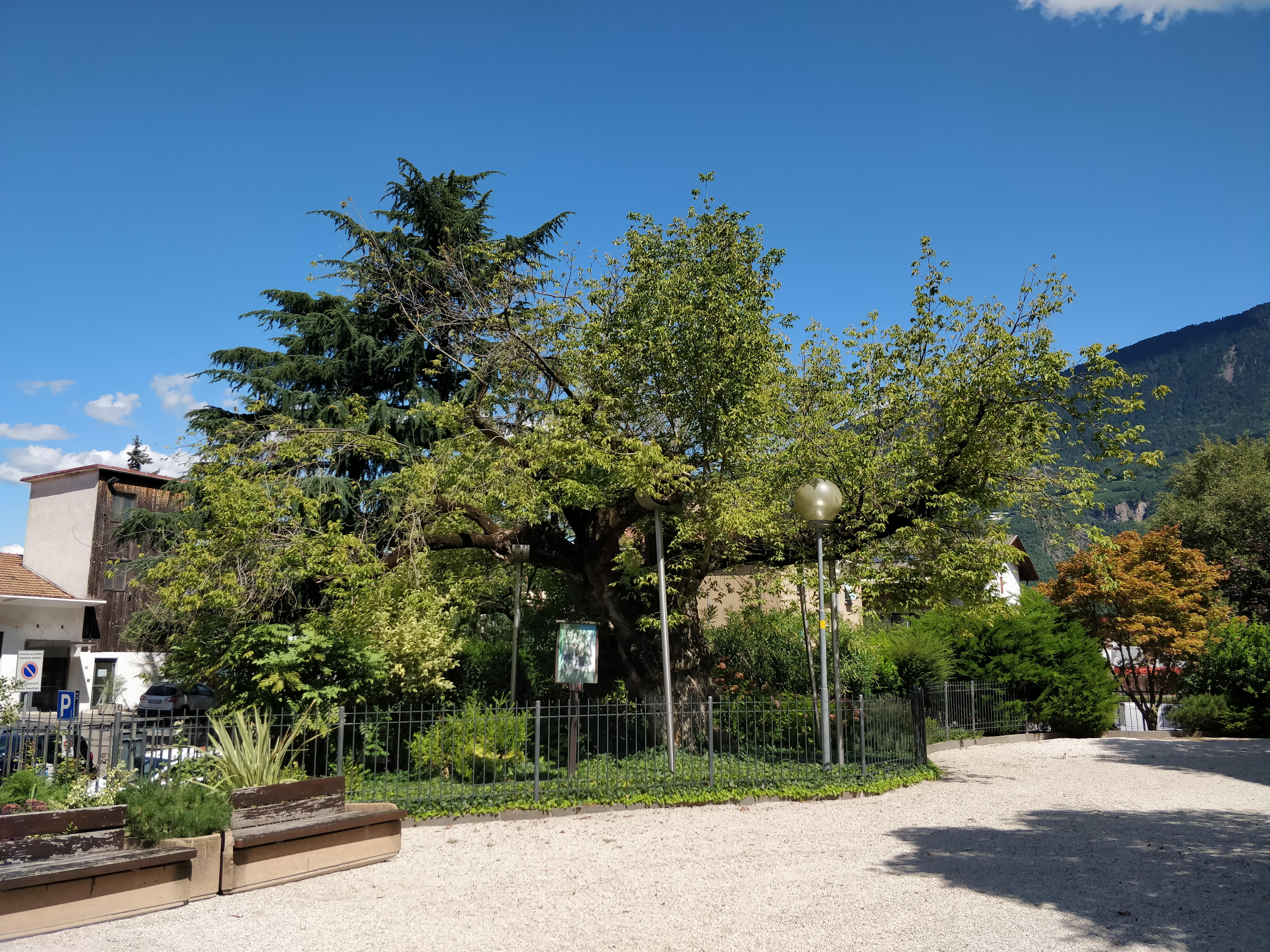 pianta monumentale a Laives